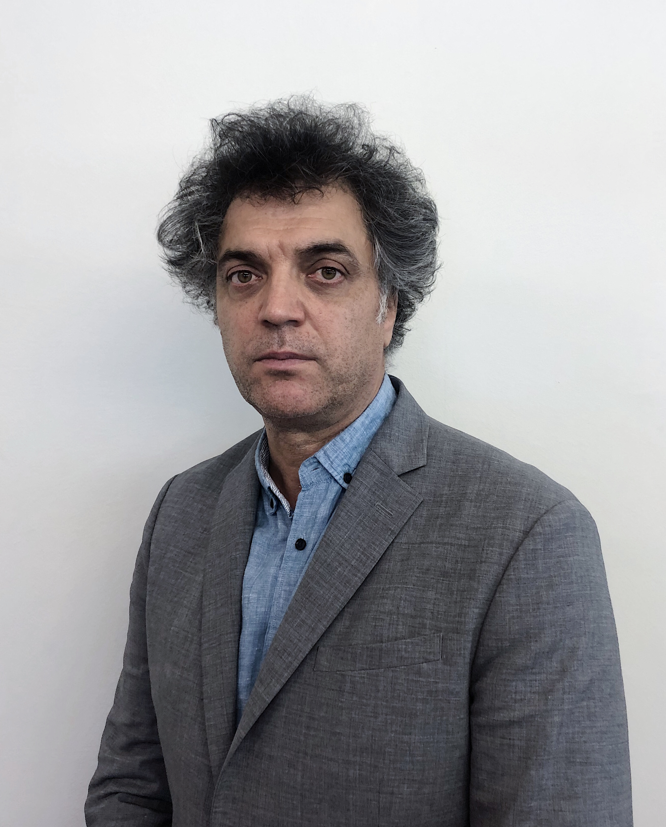 Dan Tudor - Actor&Regizor